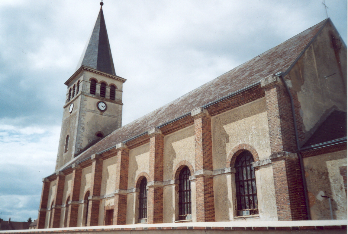 Eglise Saint-Denis à Moulicent 61290